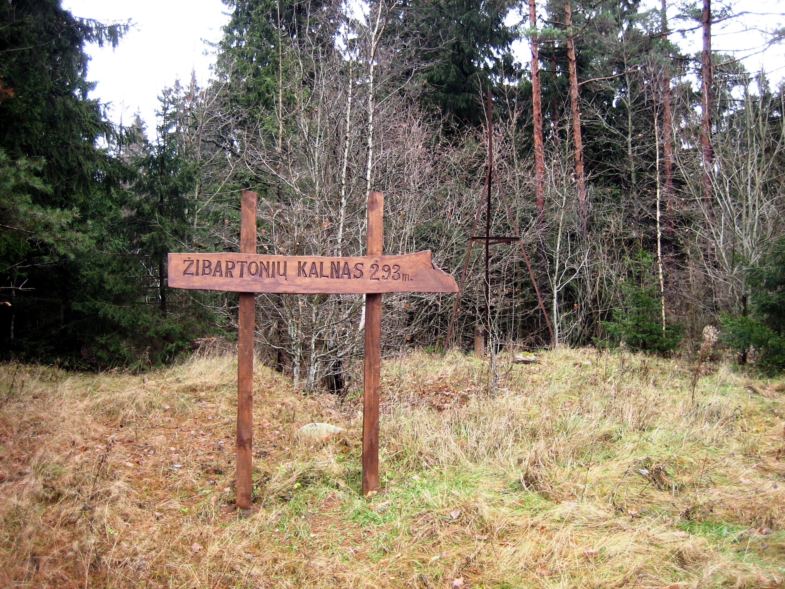 Kruopyn?s (?ibartoni?) kalva. abs.a. 293,4 m